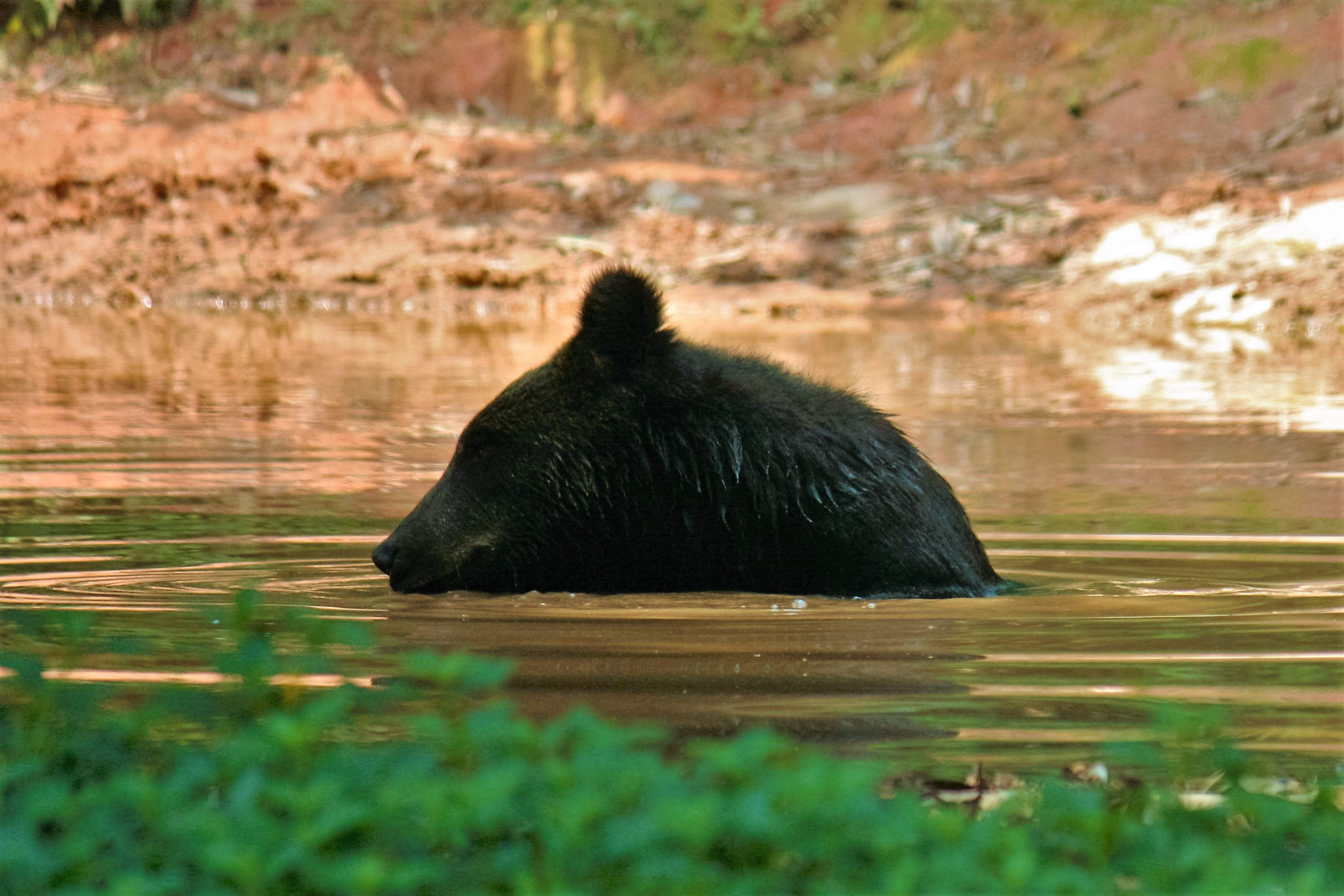 Zoo Guangzhou